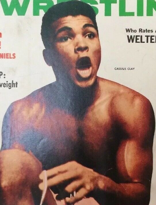 Cassius Clay en couverture du magazine de catch Boxing & Wrestling en septembre 1963.